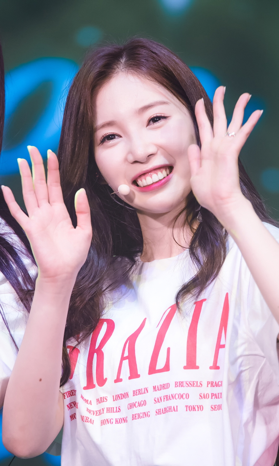 180414 에이프릴 미니콘서트